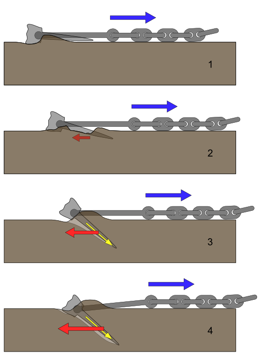 Jankar yang menggigit dasar laut.